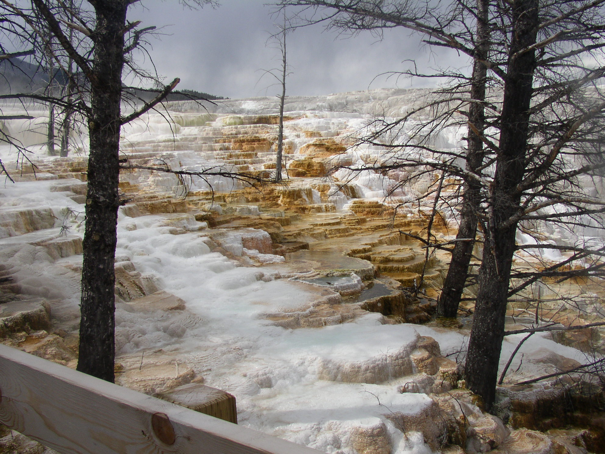 Blick auf die Sinterterassen einer heißen Quelle im Yellowstone Park USA